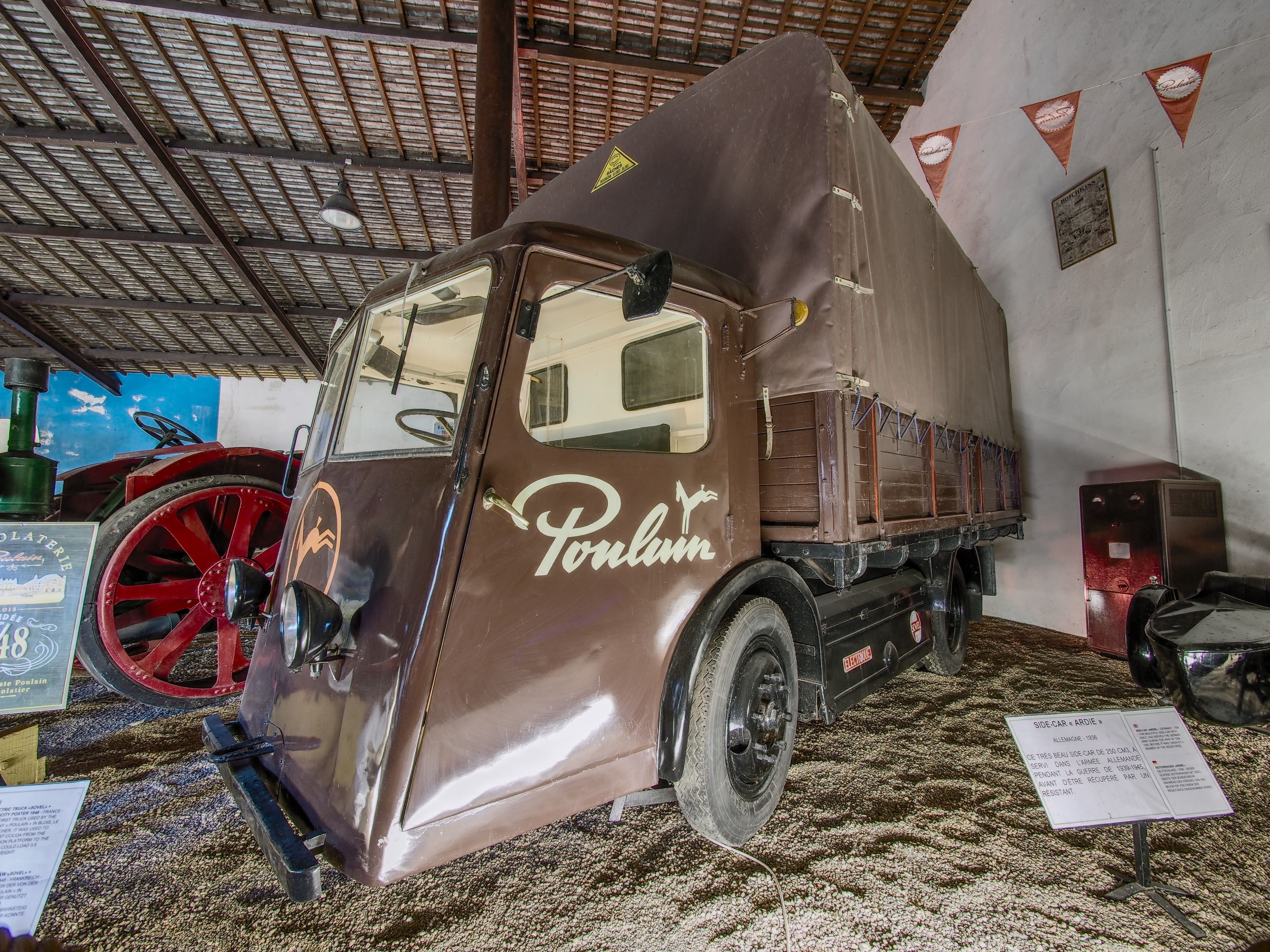 Photographed at Musée Maurice Dufresne, Azay-le-Rideau, France.